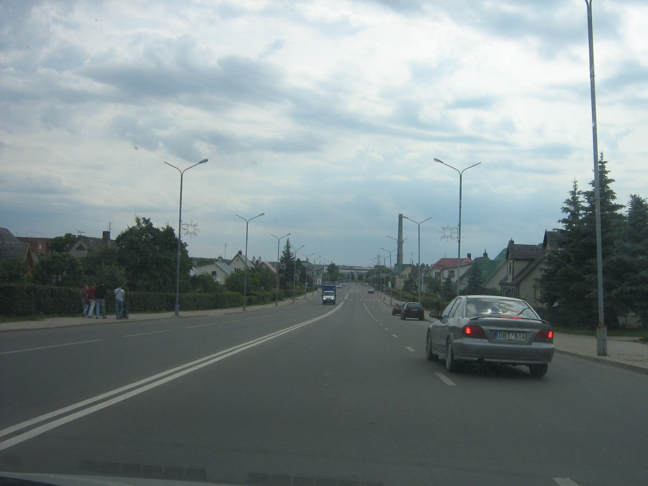 Jonavos Basanavičiaus gatvė nuo Ukmergės